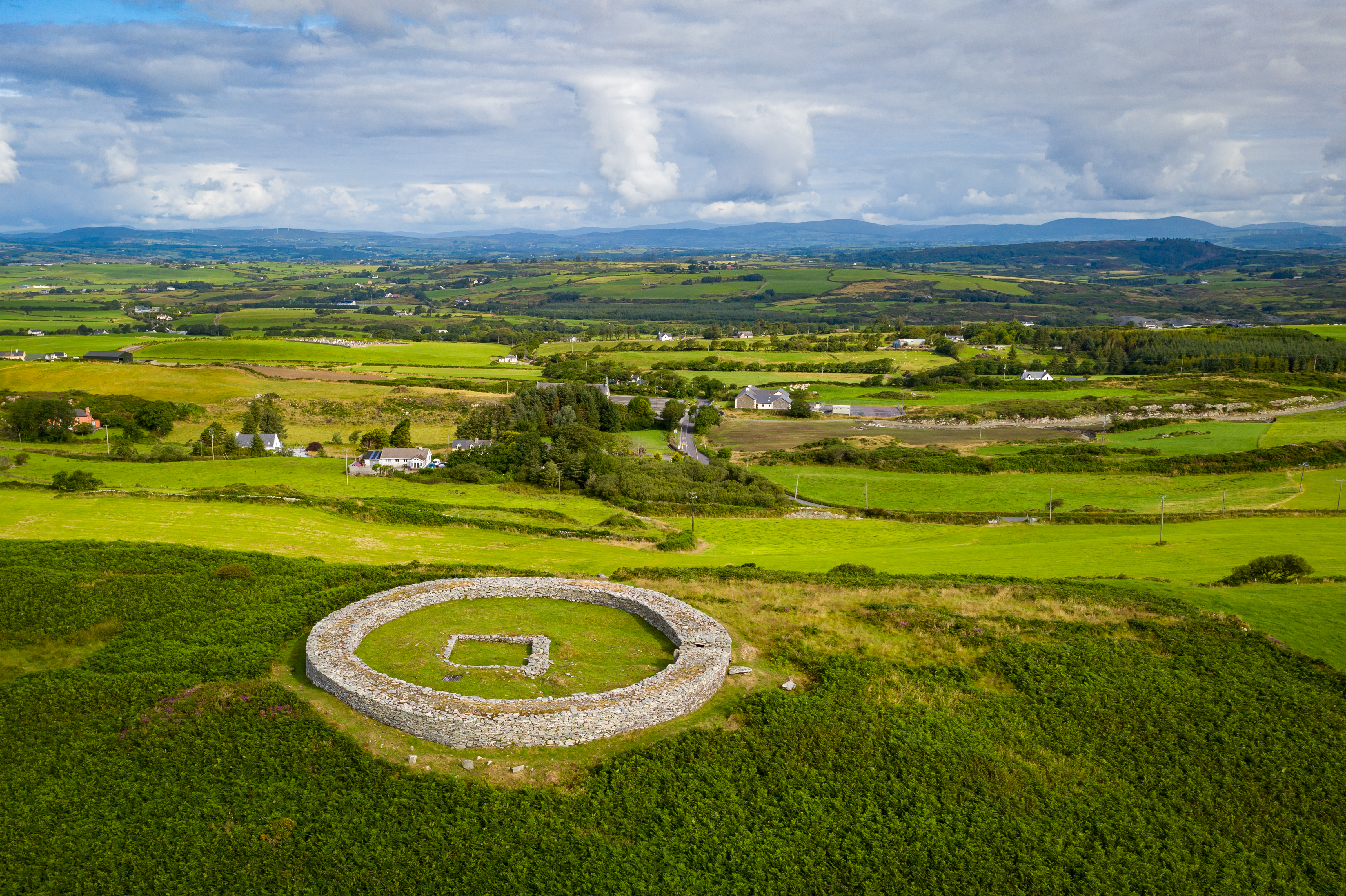 Rundfort Knockdrum, County Cork in Irland